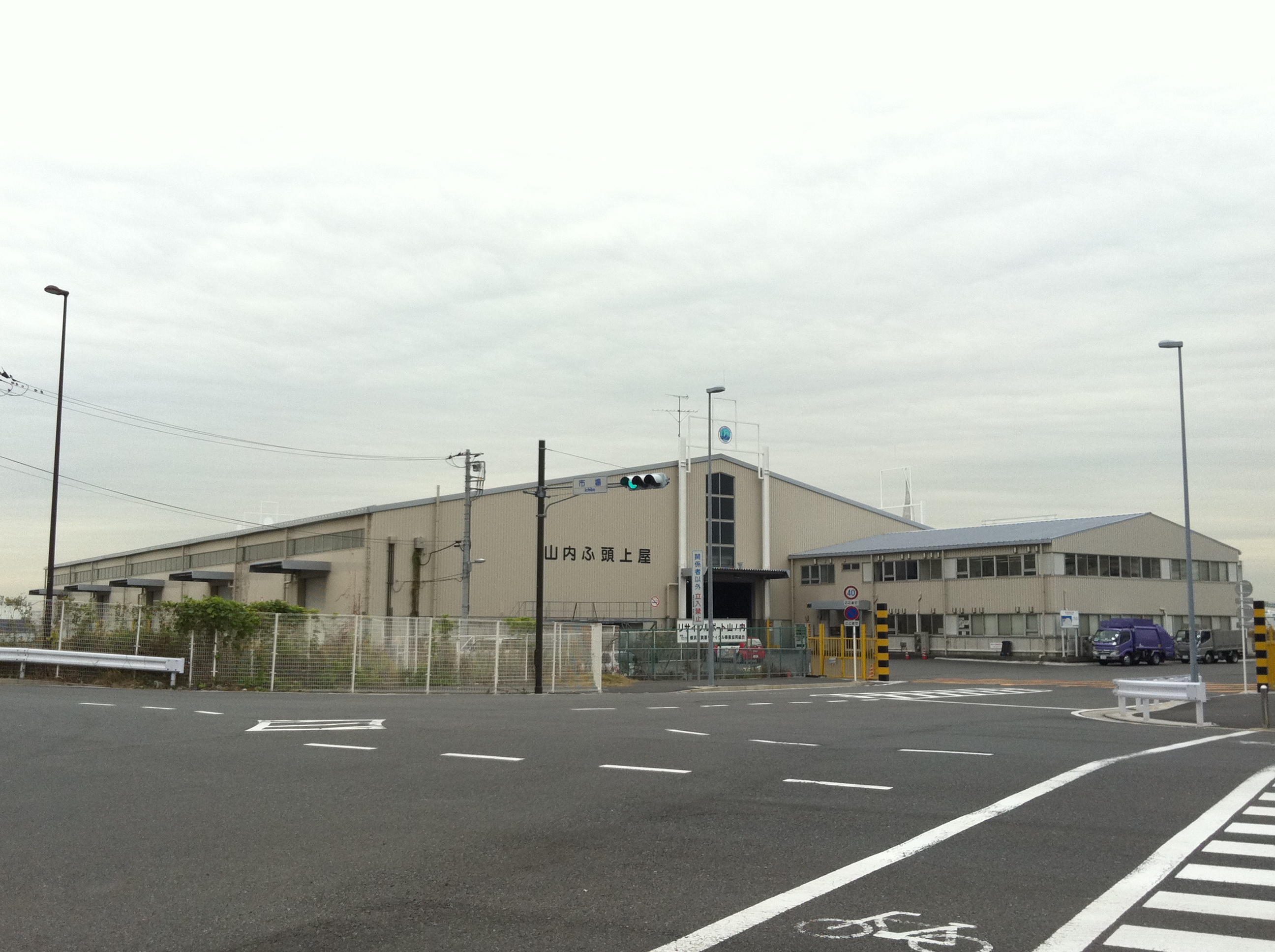 横浜市中央卸売市場本場付近にある山内ふ頭上屋（備蓄倉庫）。